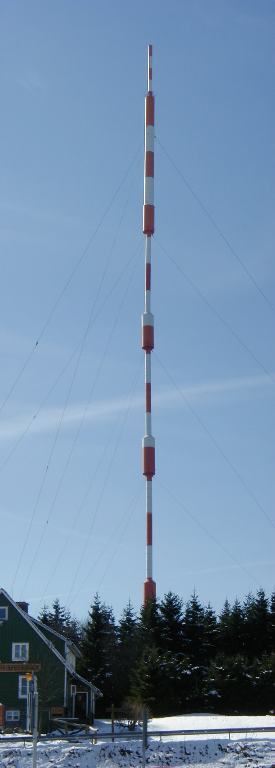 Sender Torfhaus 243m